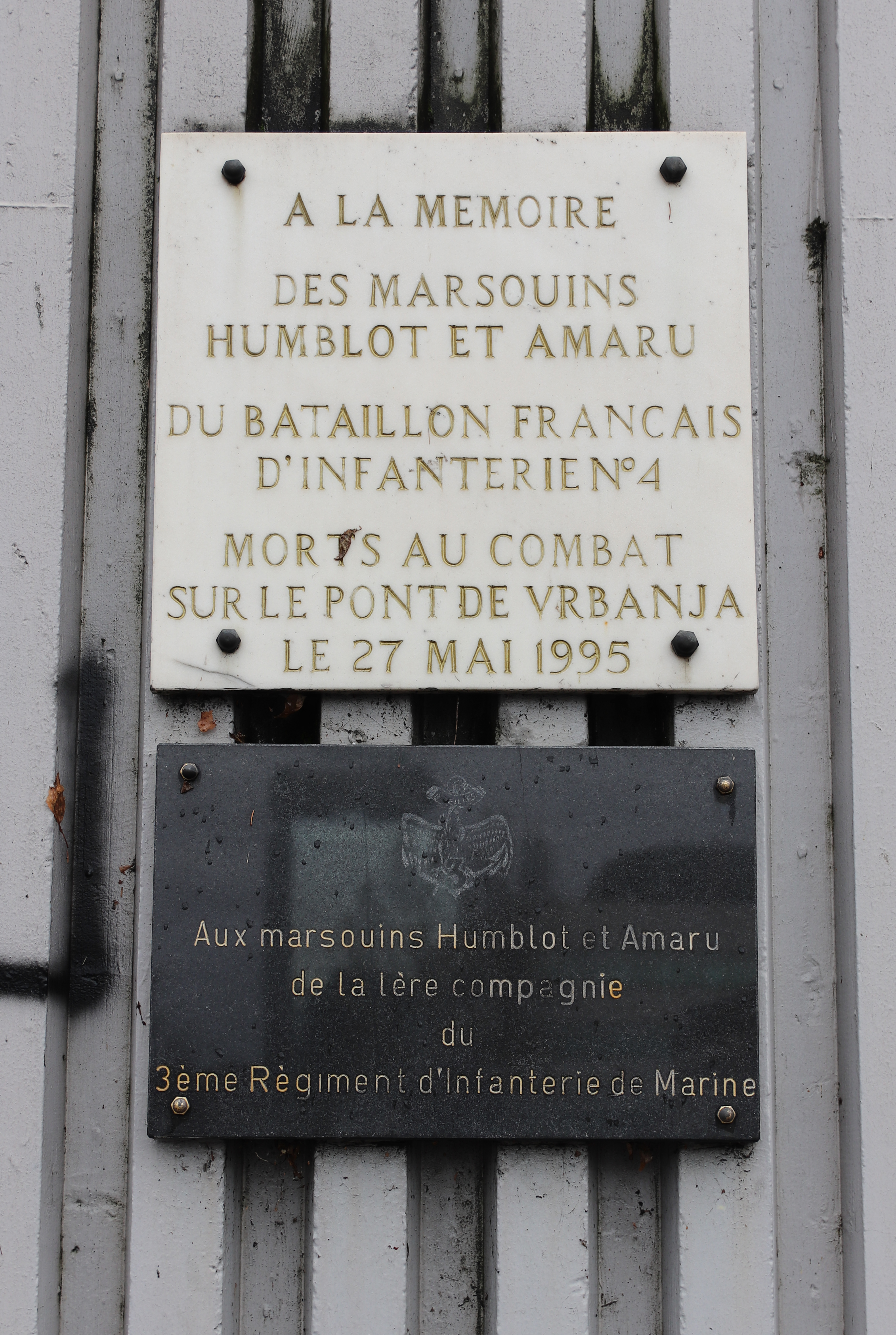 Gednenktafel für zwei am 27. Mai 1995 gefallene französische Soldaten